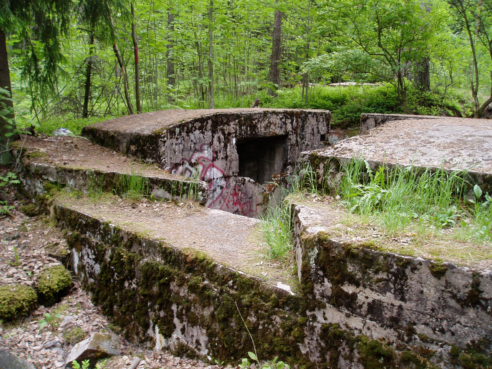 Krepost Sveaborg. Photo by Ohto Kokko.